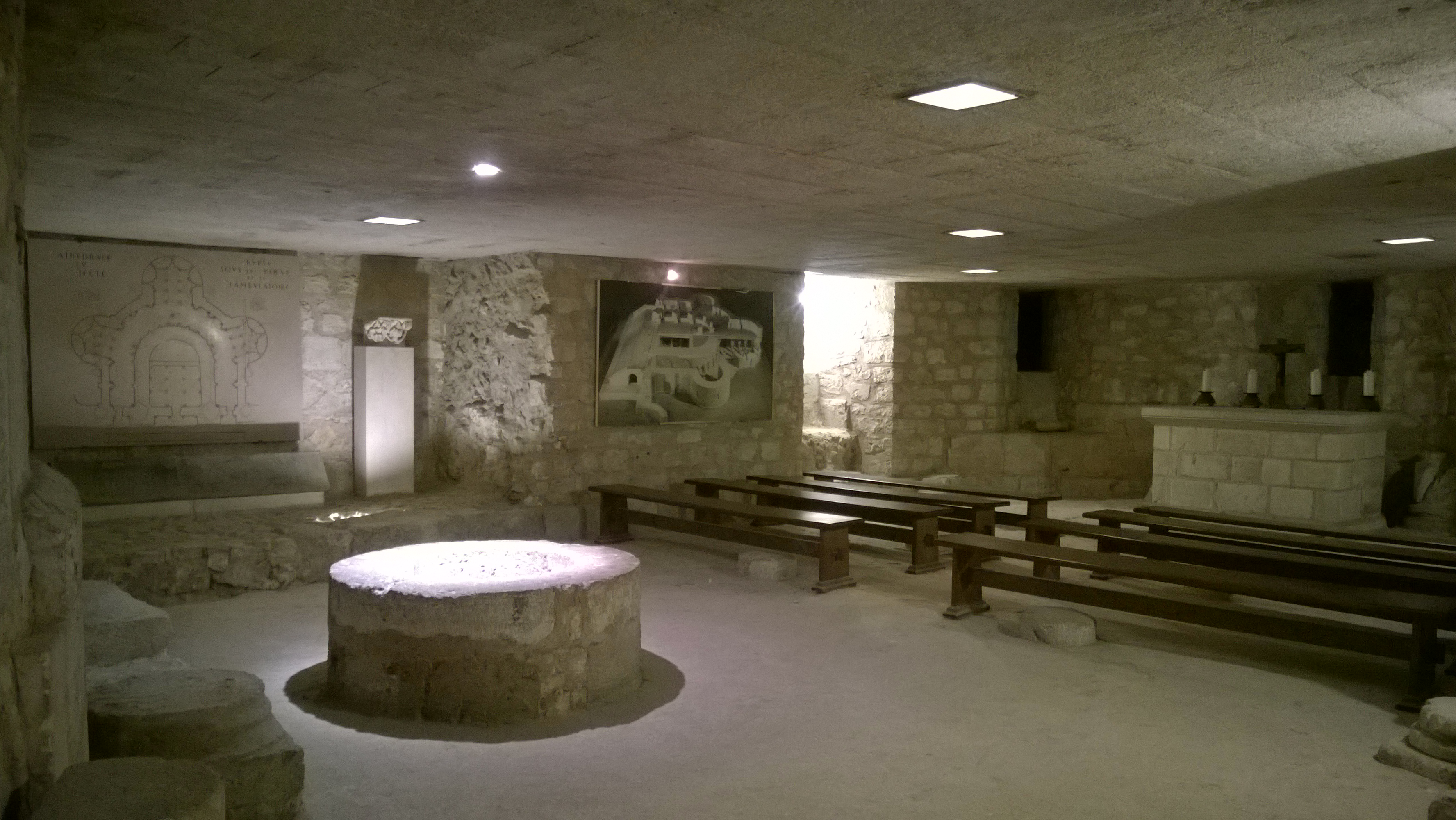 Crypte annulaire avec le puits de l'oeuvre